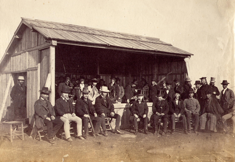 1874年内務省地理寮による金星太陽面通過観測